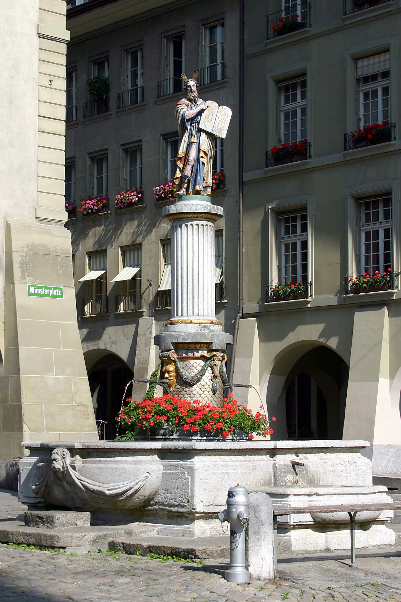 Mosesbrunnen, Bern, Switzerland